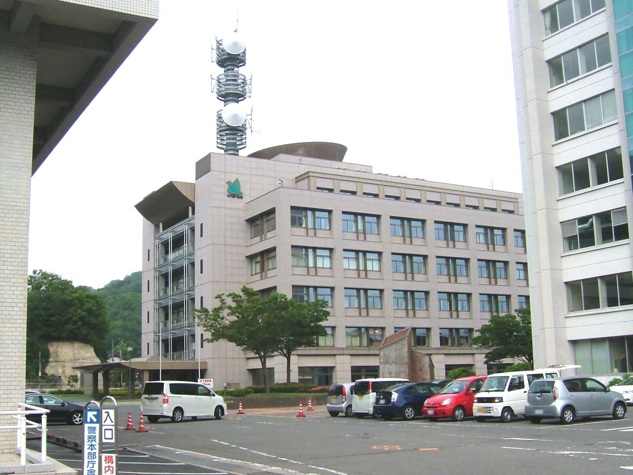 鳥取県警察本部建屋